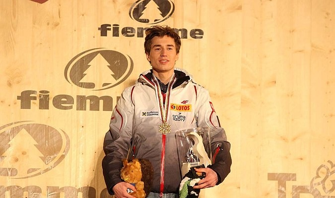 Dekoracja medalowa konkursu indywidualnego mężczyzn na skoczni K-120